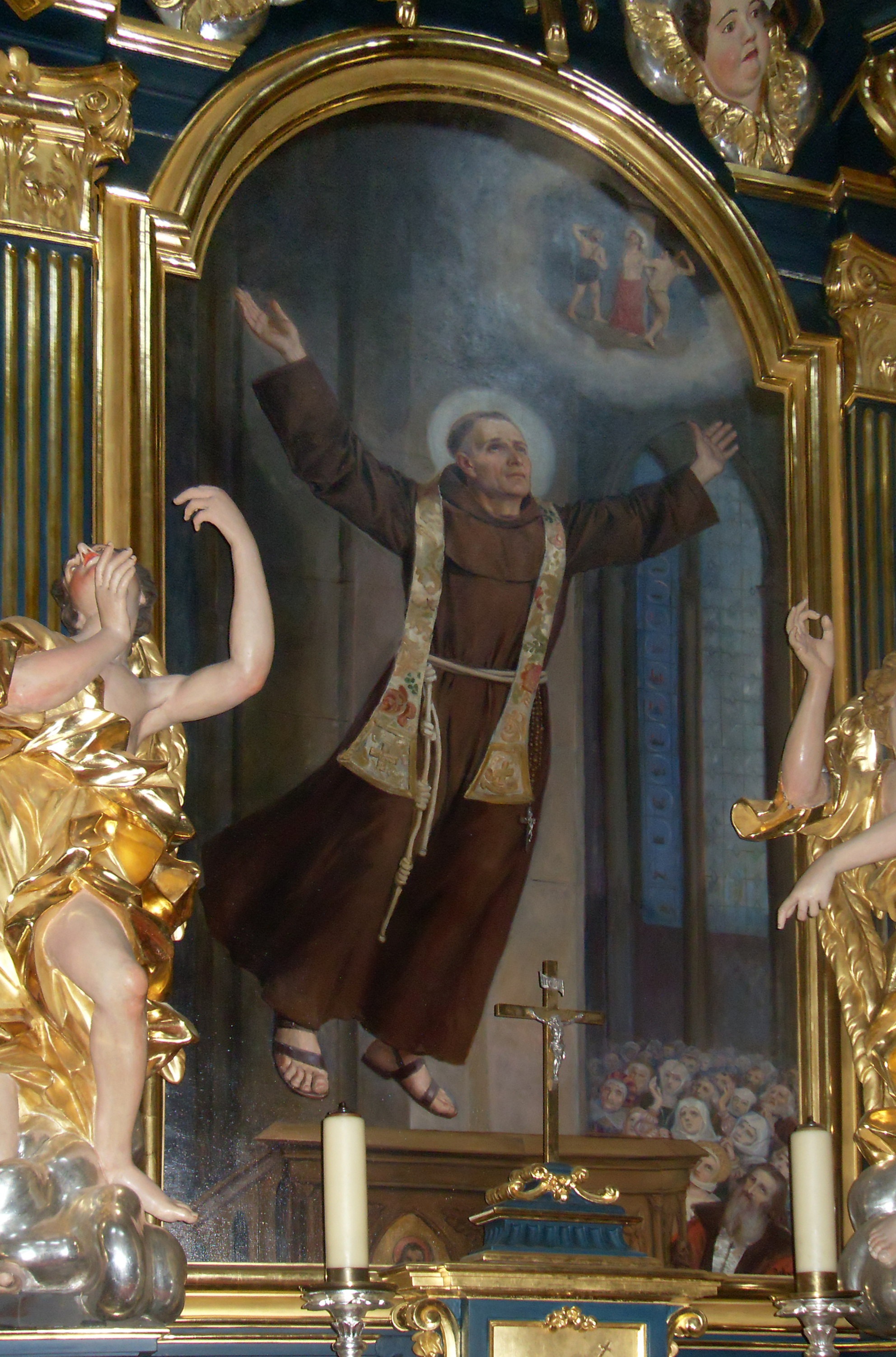 Scena lewitacji z ołtarza bł. Władysława z Gieleniowa, Kraków kościół oo. bernardynów na Stradomiu.